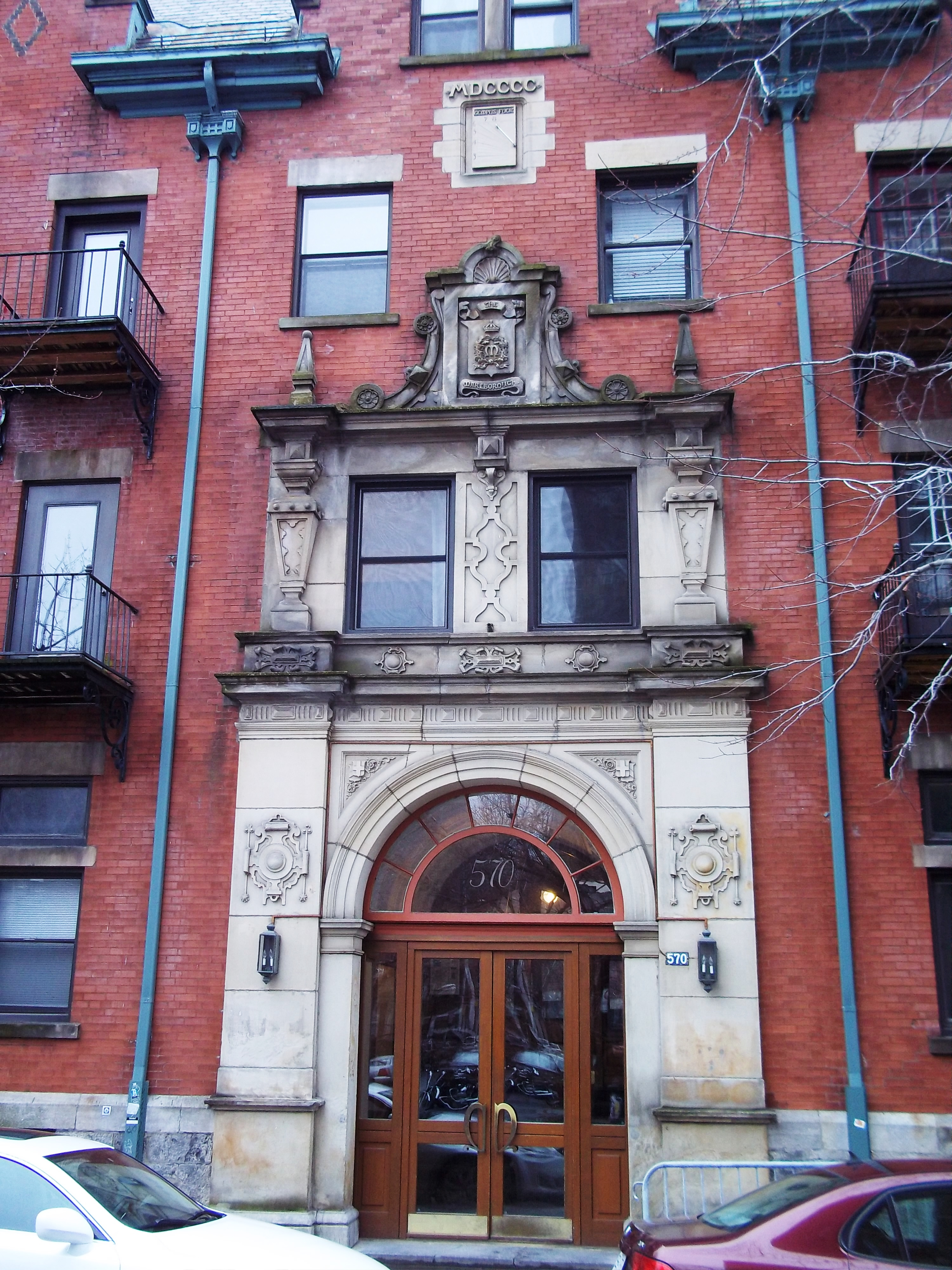 Les appartements Marlborough, 570 rue Milton, Montréal, Québec, Canada